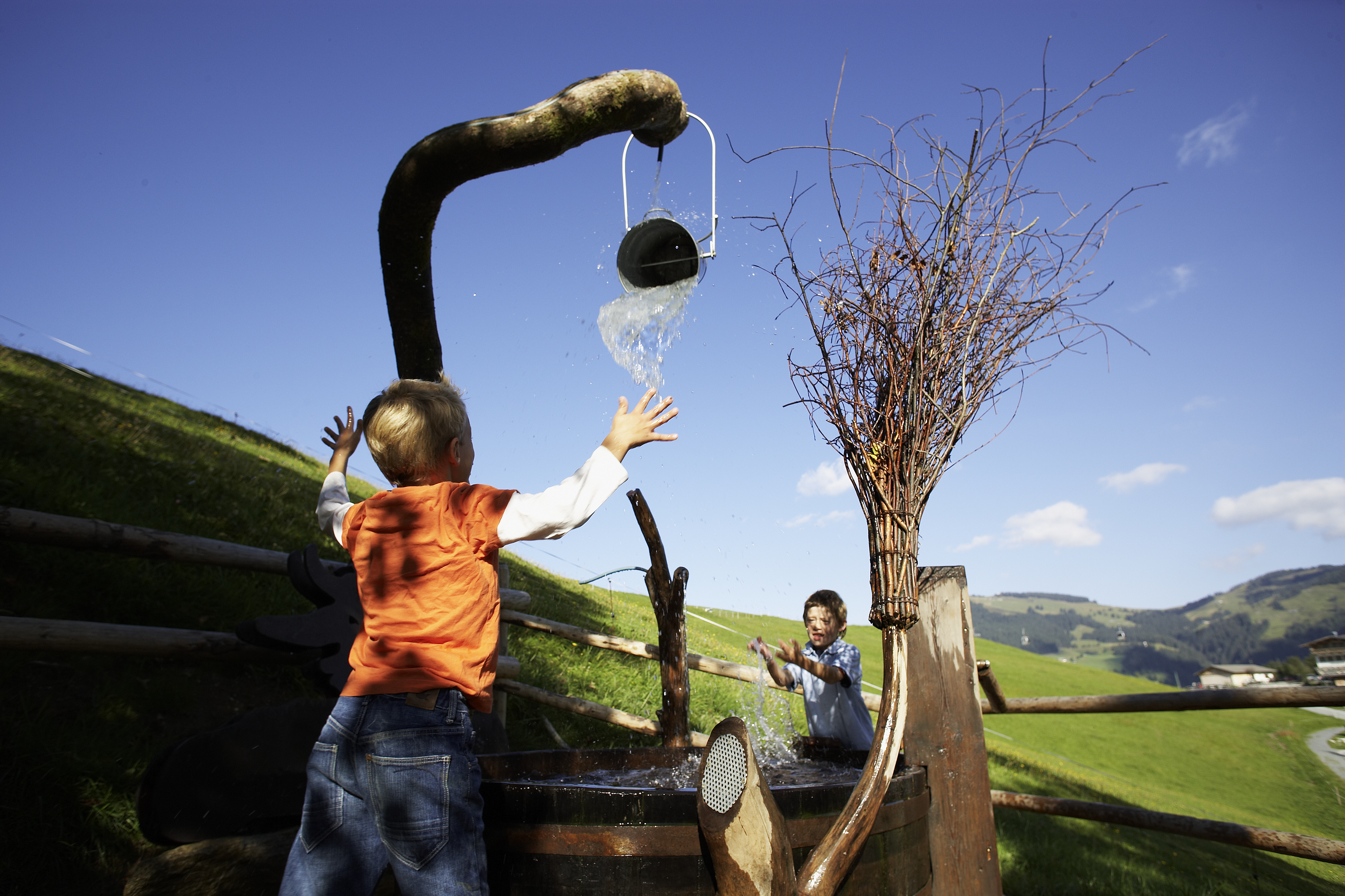 Kinder spielen im Hexenwasser